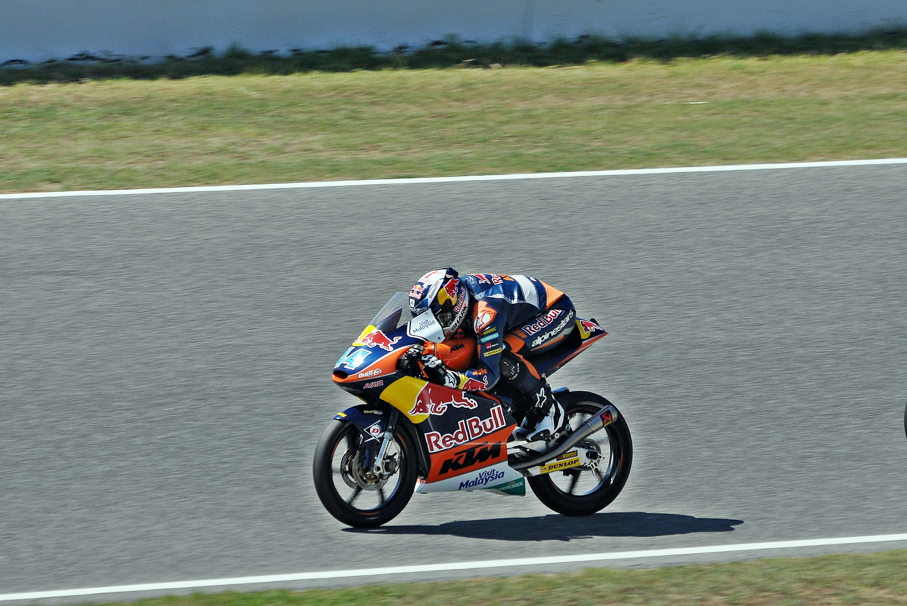 gran premio de cataluña